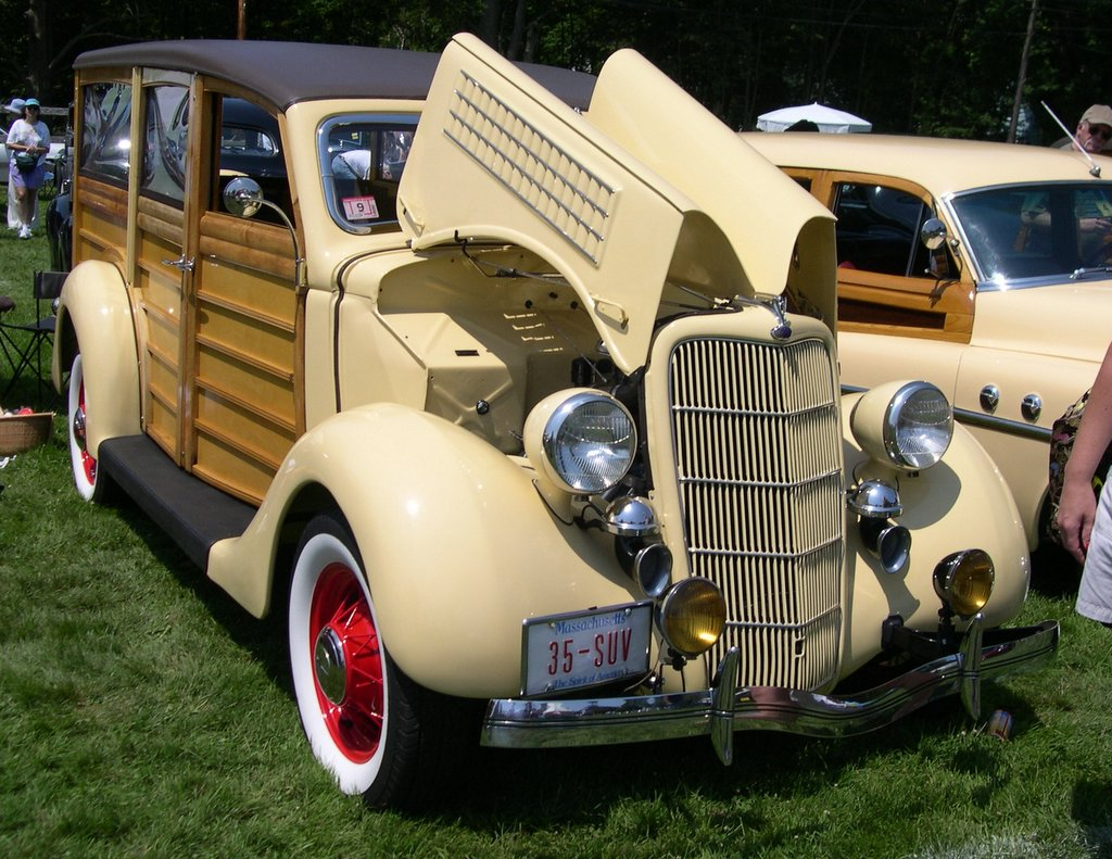 1935 Ford V8 Model 48 Woodie